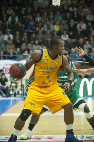 Jeremiah Wood sous le maillot de l'ALM Evreux Basket (2011-2013)